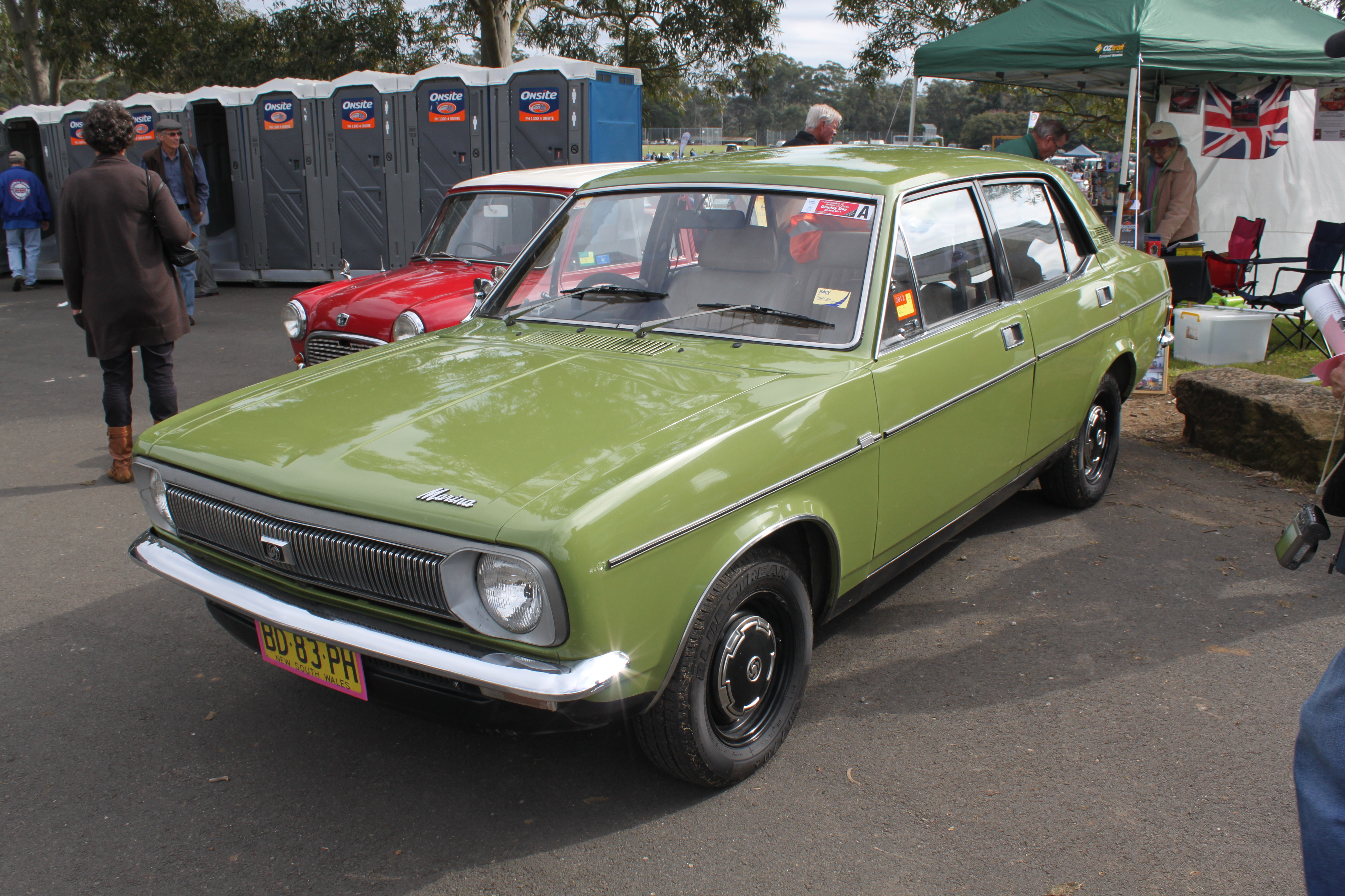 Leyland Marina